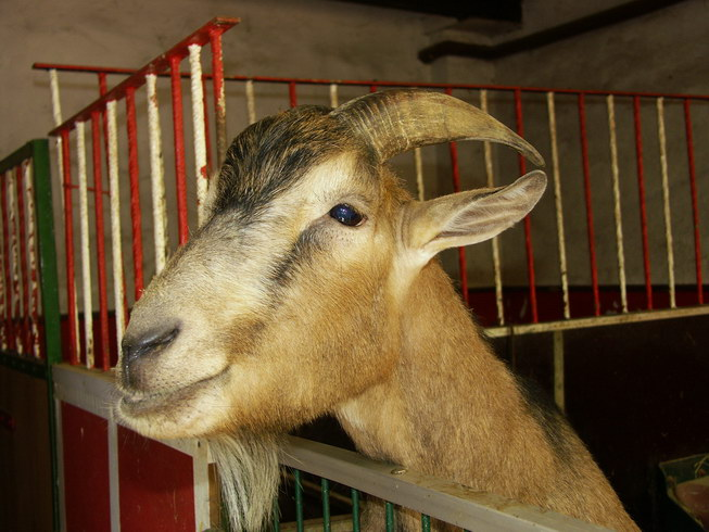 Hennes in seinem Stall, selbstfotografiert am 28 Juni 2005 v. Jörgen Schmitz